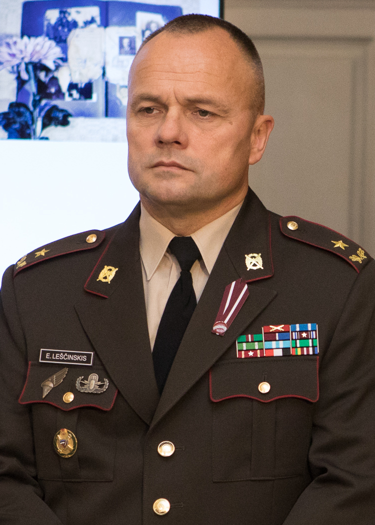 2019.gada 7.novembris. Latvijas armijas simtgadei un Lāčplēša dienai veltītā fotokonkursa jauniešiem “Varoņu spēks” izstādes atklāšana Saeimas namā. Foto: Ernests Dinka, Saeima Izmantošanas noteikumi: saeima.lv/lv/autortiesibas